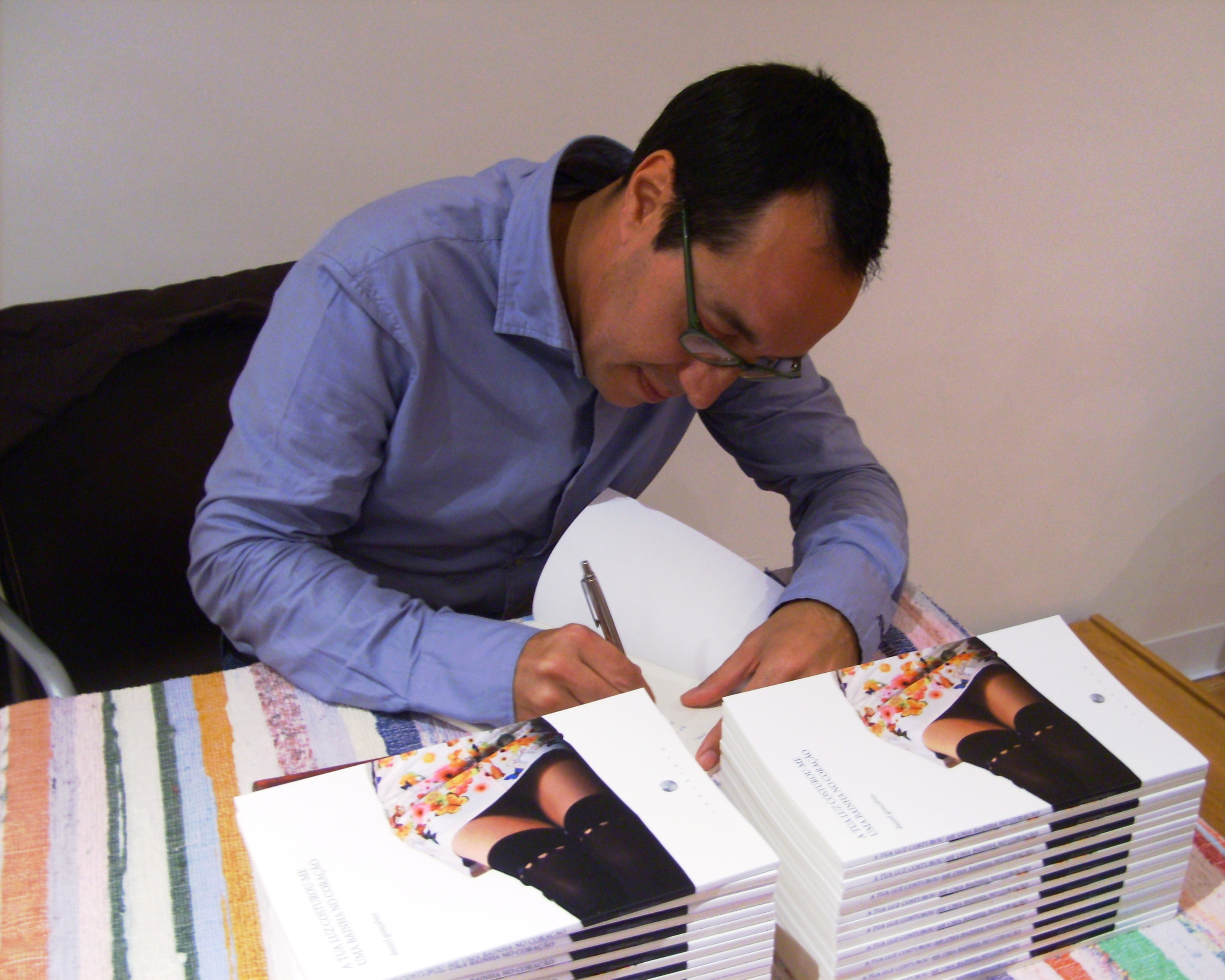 O poeta Daniel Gonçalves autografa a obra "A tua luz costurou-me uma bainha no coração" aquando de seu lançamento no auditório da Biblioteca Municipal de Vila do Porto, ilha de Santa Maria, Açores.